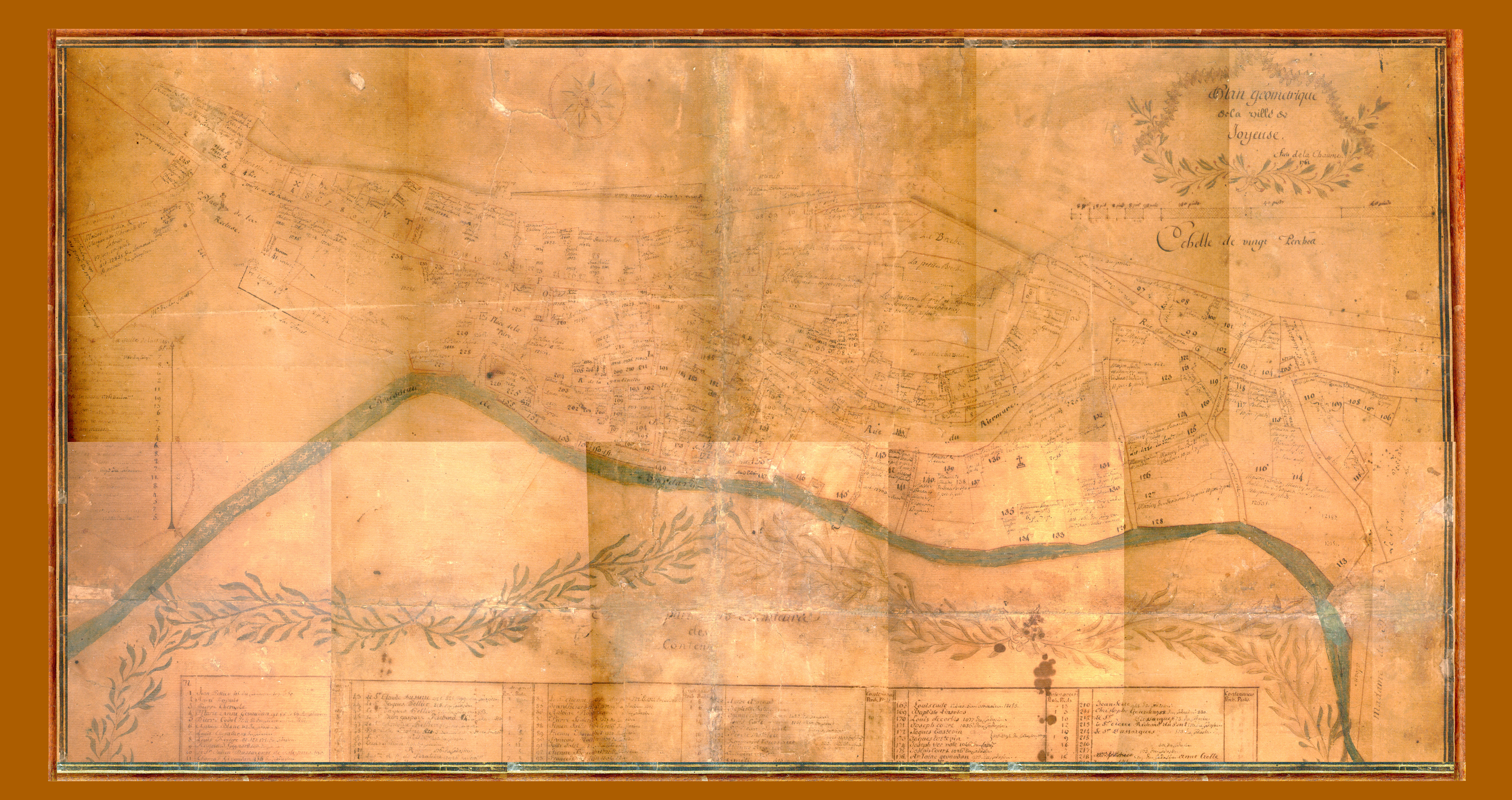 Plan réalisé en 1761 par le sieur de la Chaume. (Archive personnelle)